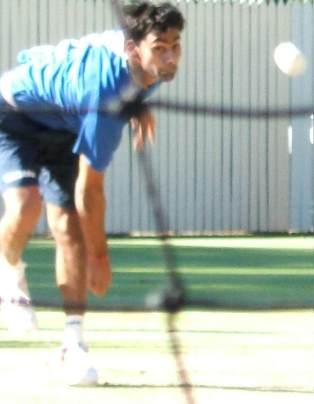 Praveen Kumar at Adelaide Oval